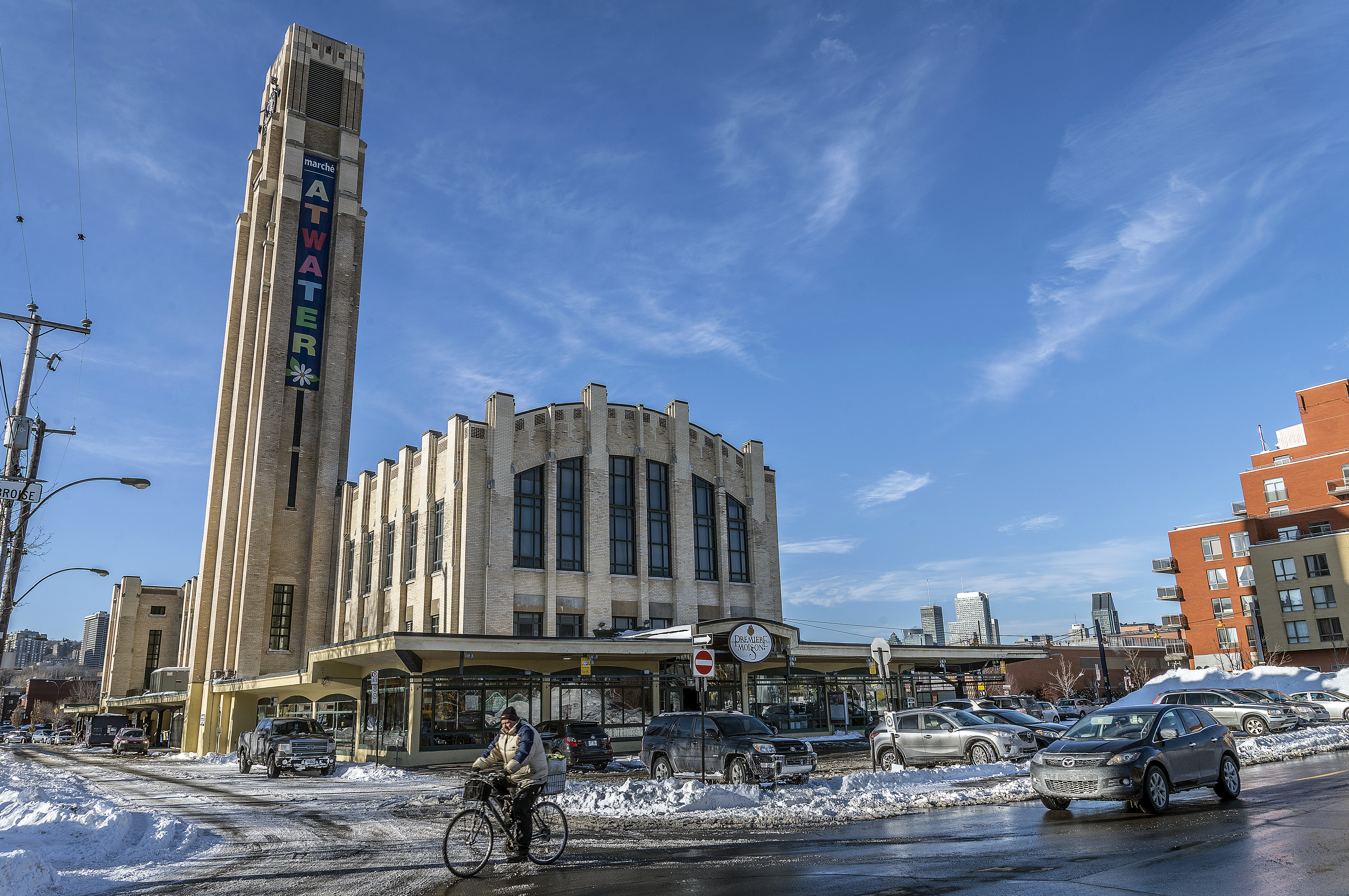 Saint-Henri est un quartier de l'arrondissement du Sud-Ouest de la ville de Montréal (au Québec, Canada). Le quartier Saint-Henri est délimité à l'est par l'avenue Atwater, au sud par le canal de Lachine, à l'ouest par l'autoroute 15 et au nord par les quartiers de Notre-Dame-de-Grâce et la ville de Westmount.